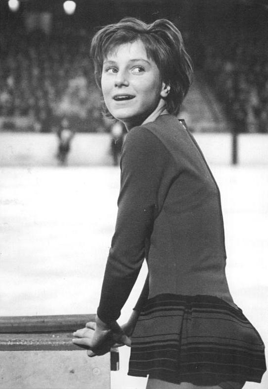 Martina Clausner Zentralbild Kohls 27.1.1966 Eiskunstlauf-Europameisterschaften 1966 DDR-Teilnehmer: Martina Claussner (SC Karl-Marx-Stadt). Die Europameisterschaften finden vom 1.-6.2.1966 in Bratislava statt. -Archivfoto